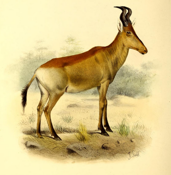 Illustration of Lichtenstein's hartebeest